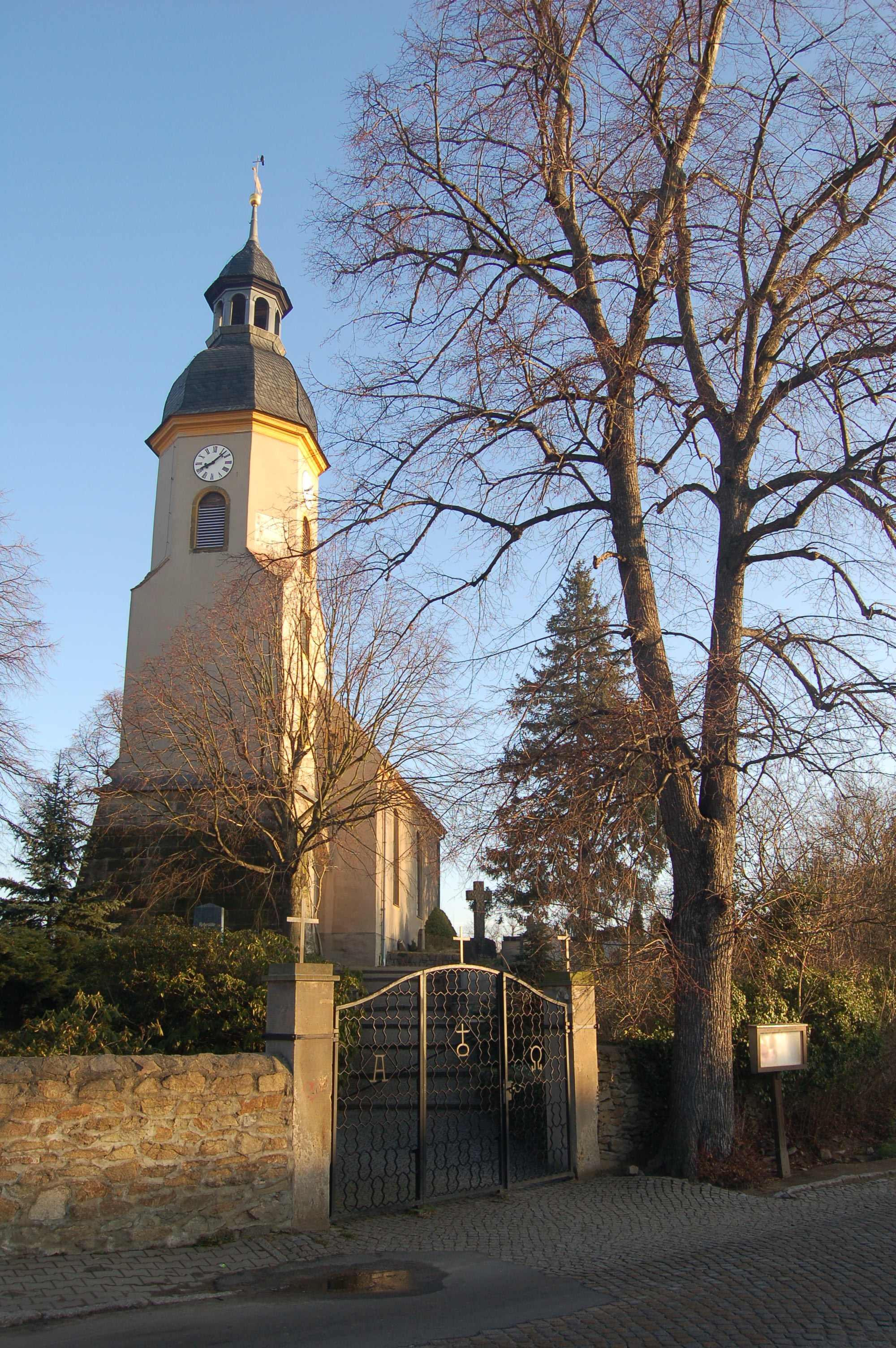 church in Grünberg(Saxony)